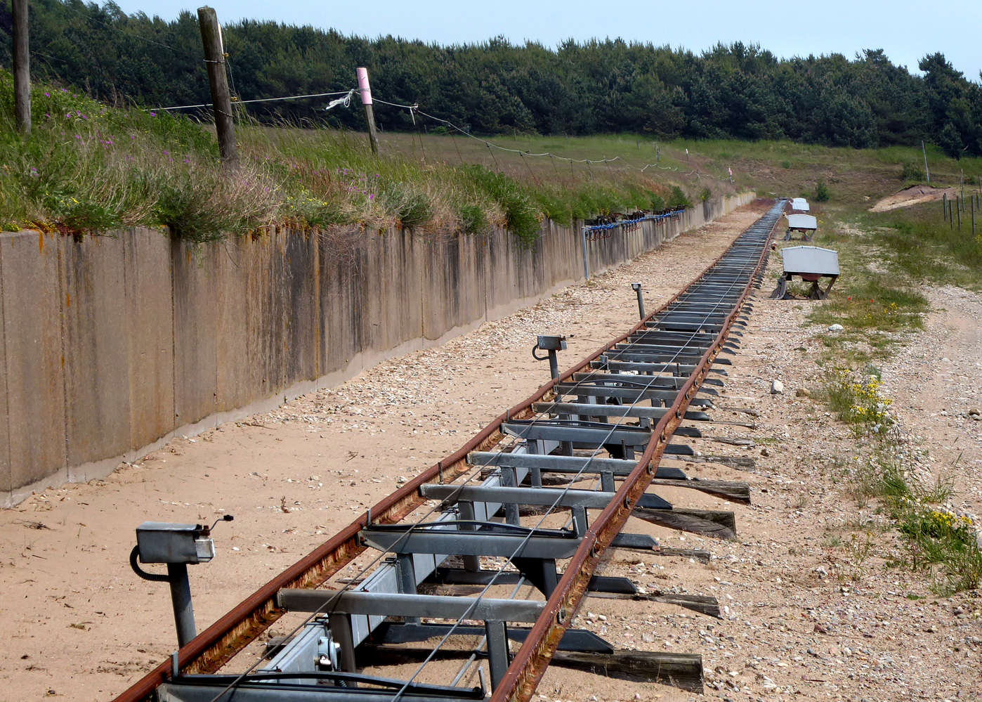 Målrälsbana vid Kabusa skjutfält, strax öster om Ystad 9 juni 2017.